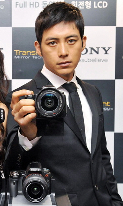 소니코리아 DSLT 알파 33/55 발표회에서의 고수